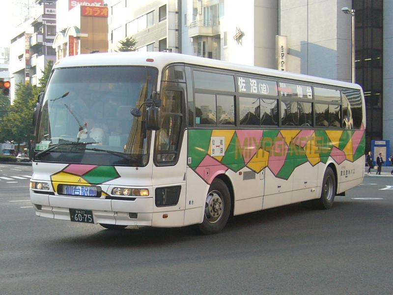 登録番号 宮城22か60-75 宮交登米バス所属 （撮影当時・現ミヤコーバス） 仙台 - 佐沼線用 2006年10月29日 仙台広瀬通にて撮影 撮影者 Tokatsu kokubu